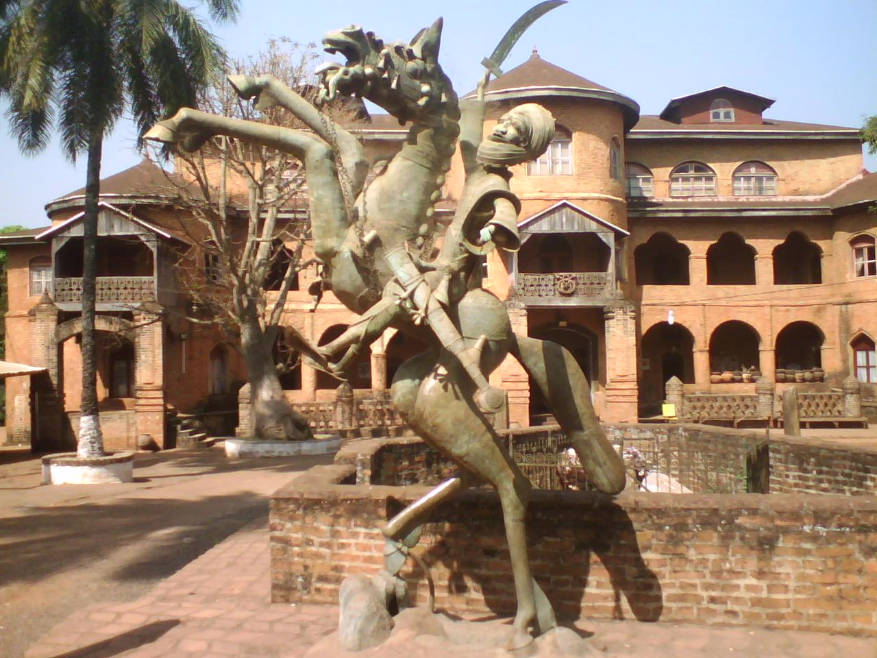 Monument du guerrier